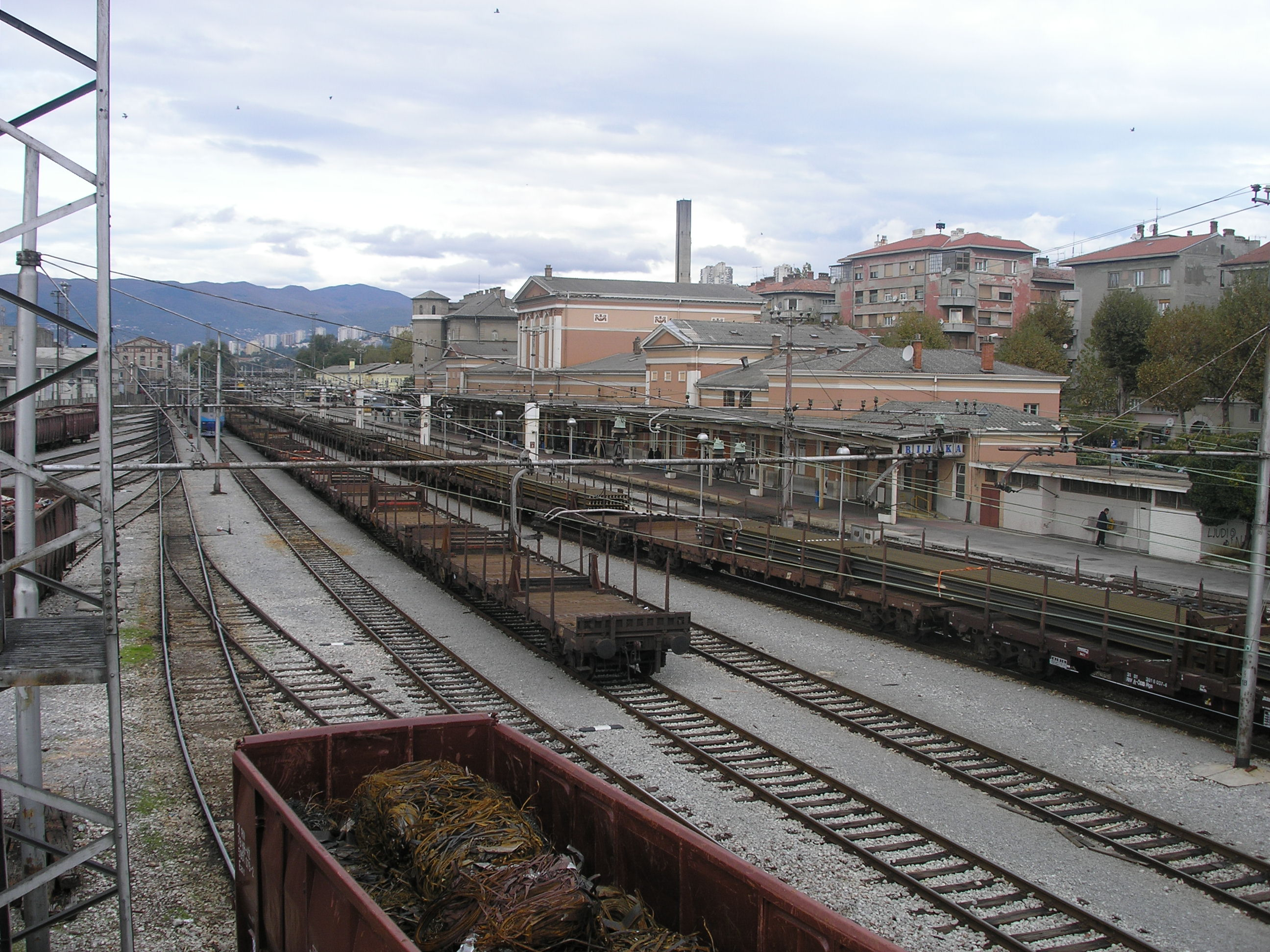 Rijeka railway station, Croatia